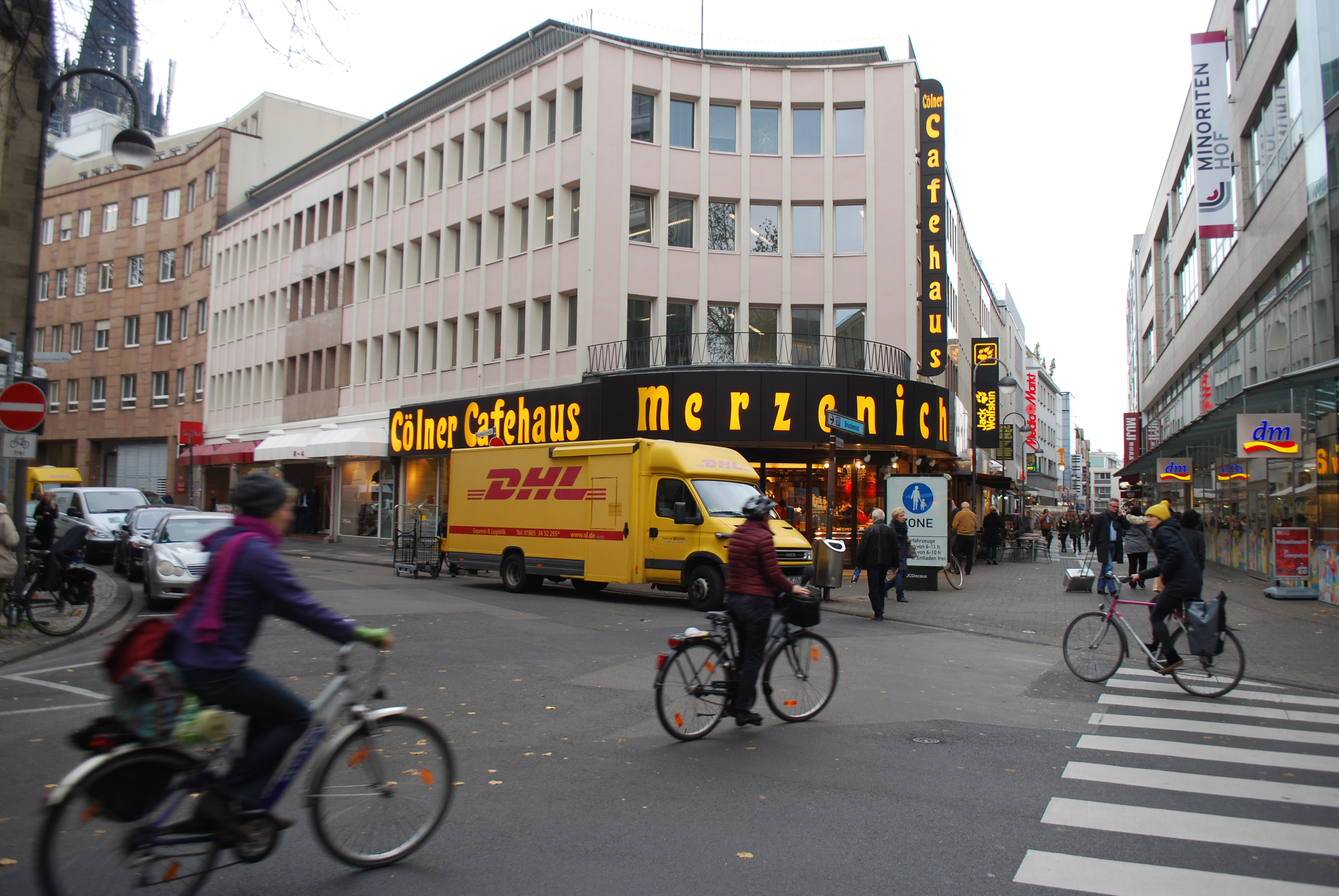 Vue de Cologne.